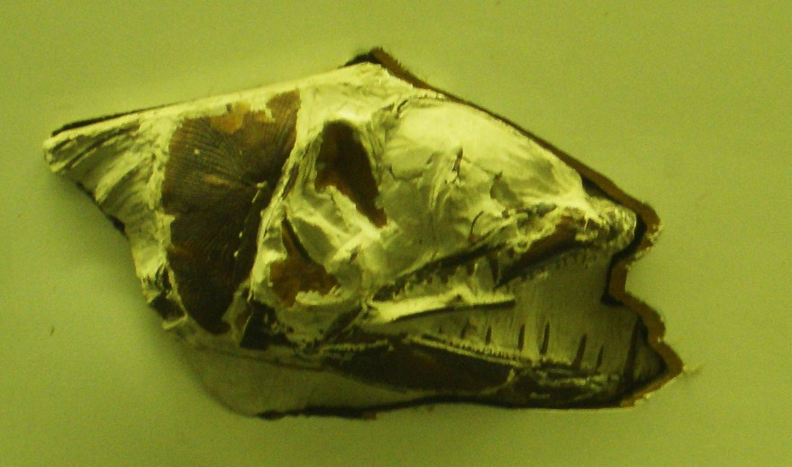 Fossil of Enchodus, an extinct fish- Took the photo at Senckenberg Museum of Frankfurt